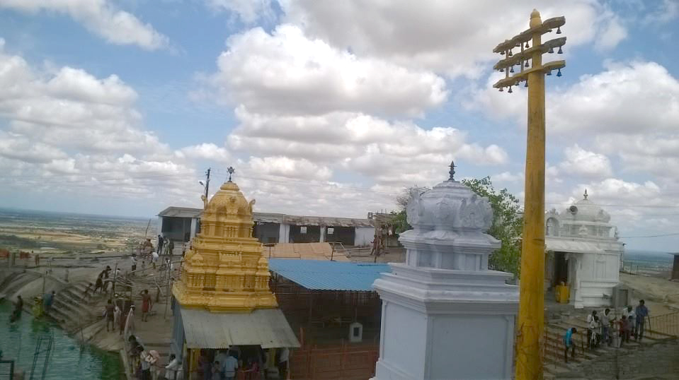 వేమలకొండ మత్స్యగిరి లక్ష్మీ నరసింహ స్వామివారి దేవాలయం